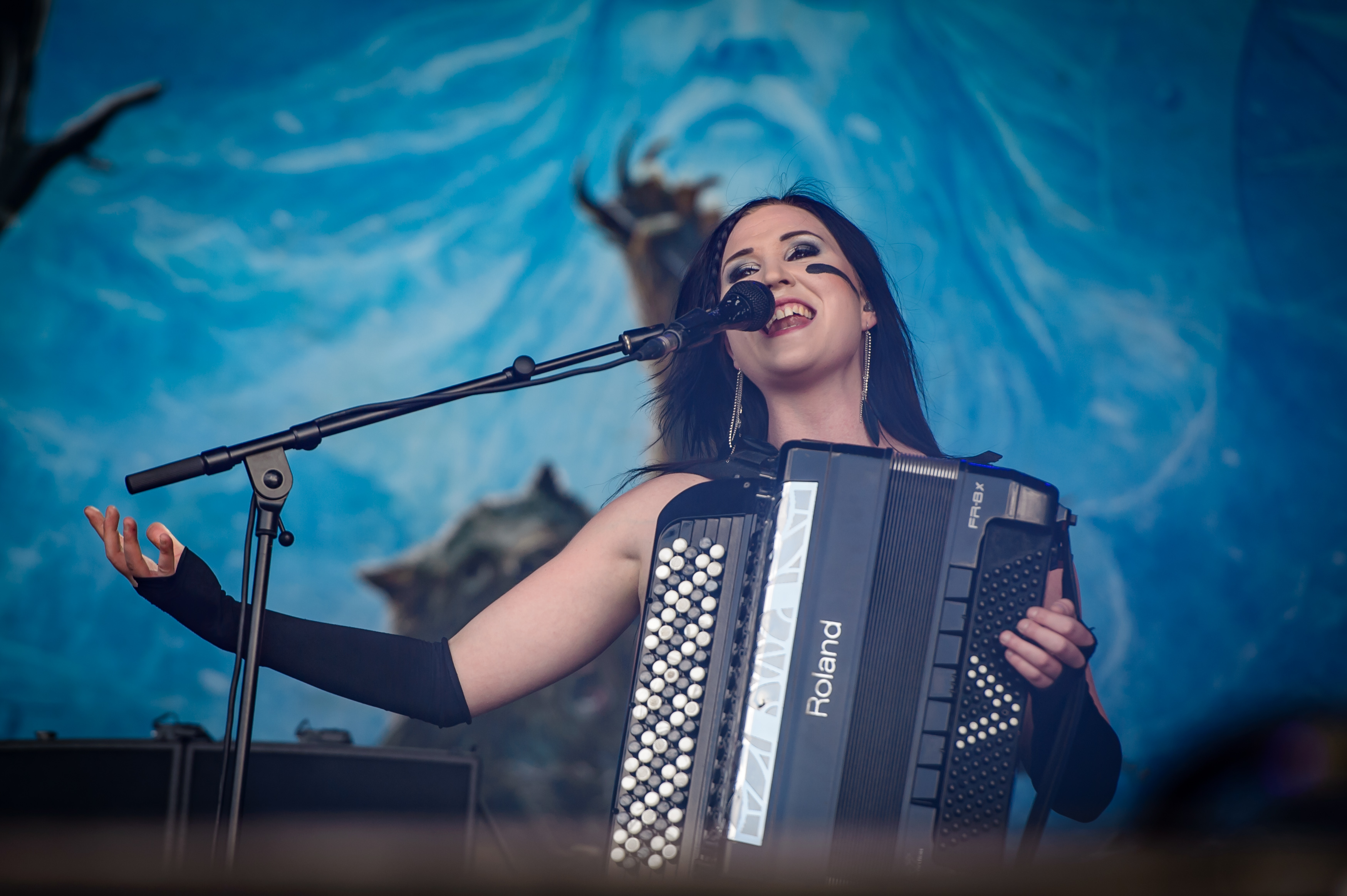 'RockHarz Open Air 2016; Ballenstedt': 'Ensiferum'